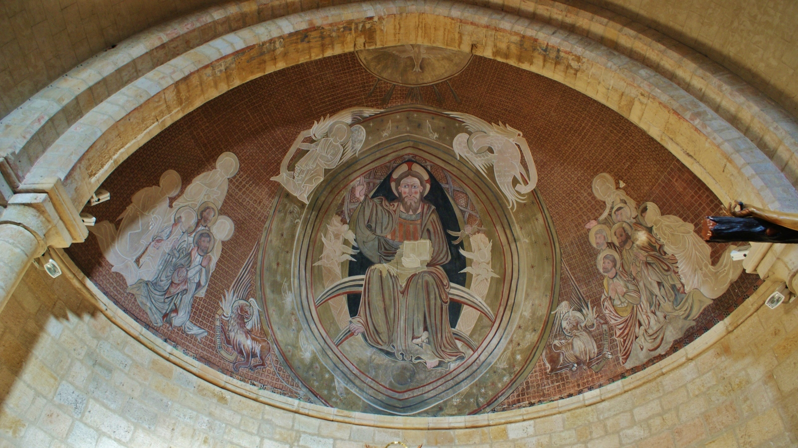 Pantocrator pintado sobre el ábside, enmarcado en mandorla también pintada. Su pintura ha sido fechada en el primer cuarto del siglo XIV, conservándose detrás de un retablo barroco destruido en el año 1936, lo que dio lugar a su hallazgo. Iglesia de Nuestra Señora de la Asunción de Valdeolivas. Cuenca, Castilla-La Mancha